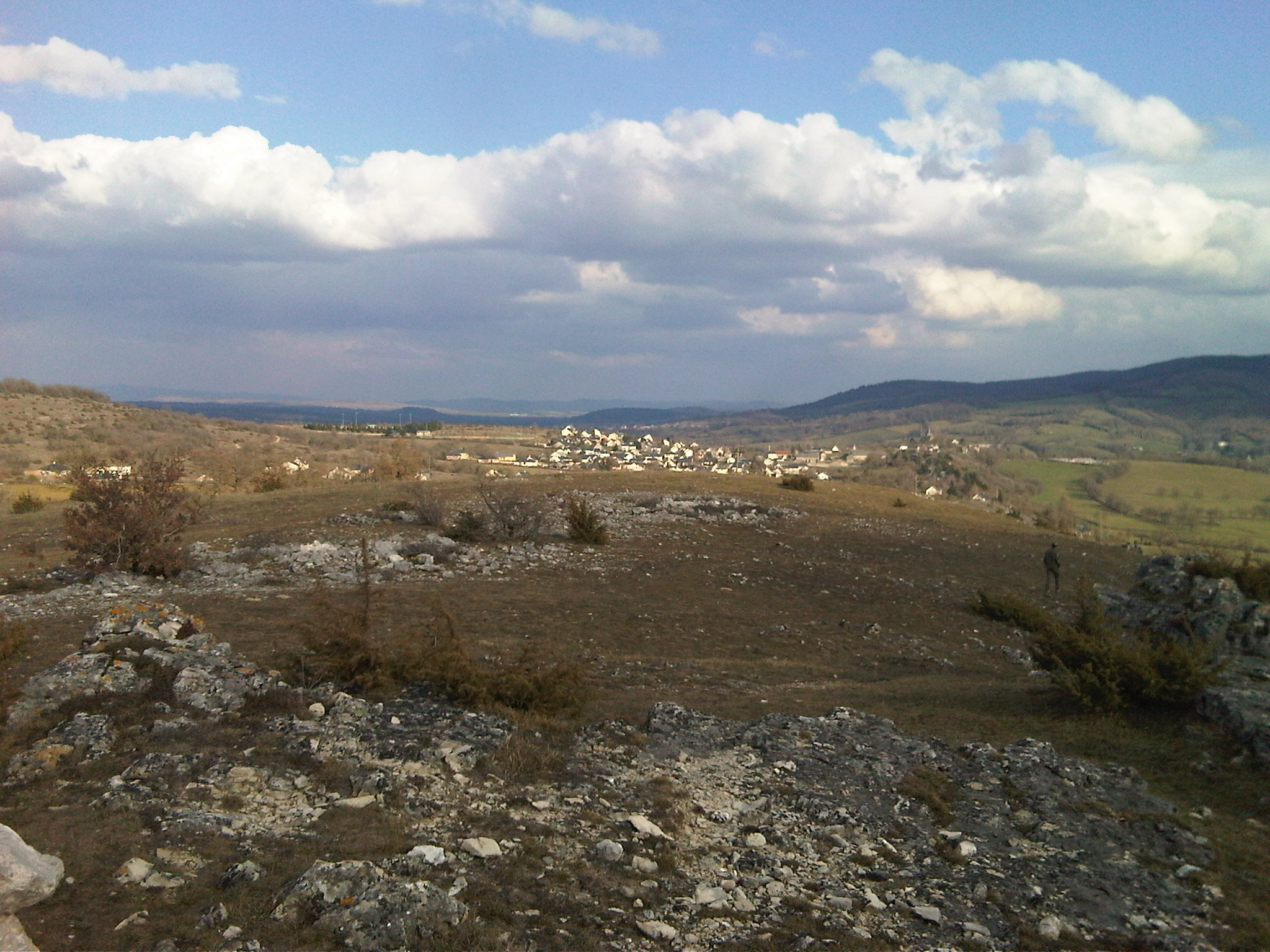 Photo de Gages 12630